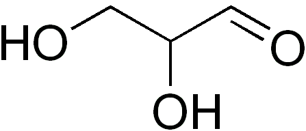 zelf gemaakte afbeelding. GFDL/cc-by-sa-2.5